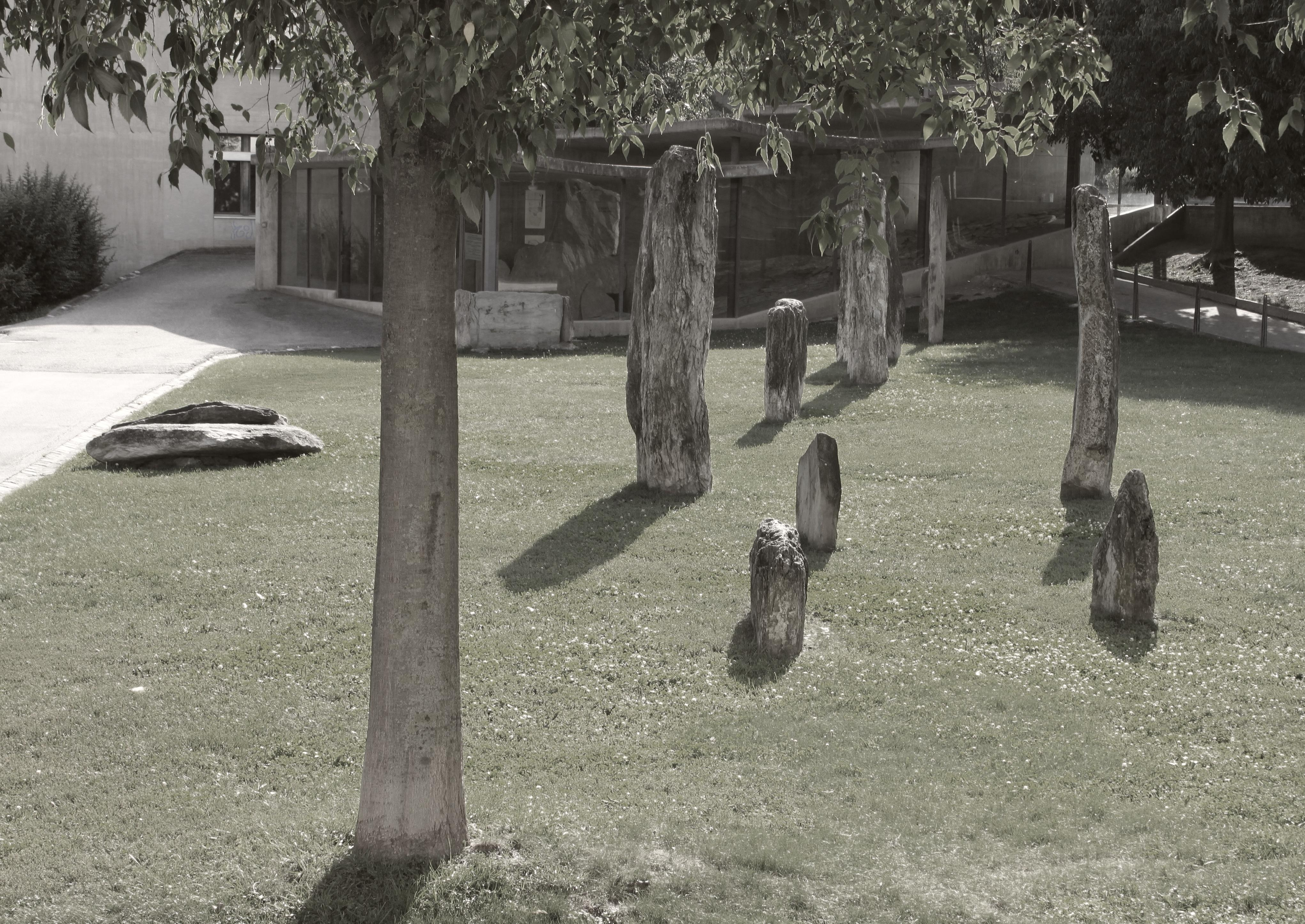 Suisse, canton du Valais, Sion, la ville : la nécropole du Petit-Chasseur et celle de Sous-le-Scex témoignent de l'occupation de la ville dès le néolithique.